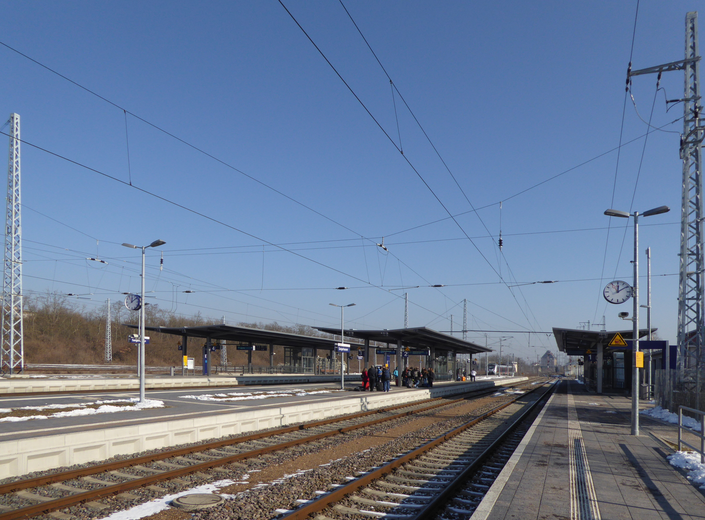 Bahnsteige des Bahnhofs Sangerhausen, Februar 2017